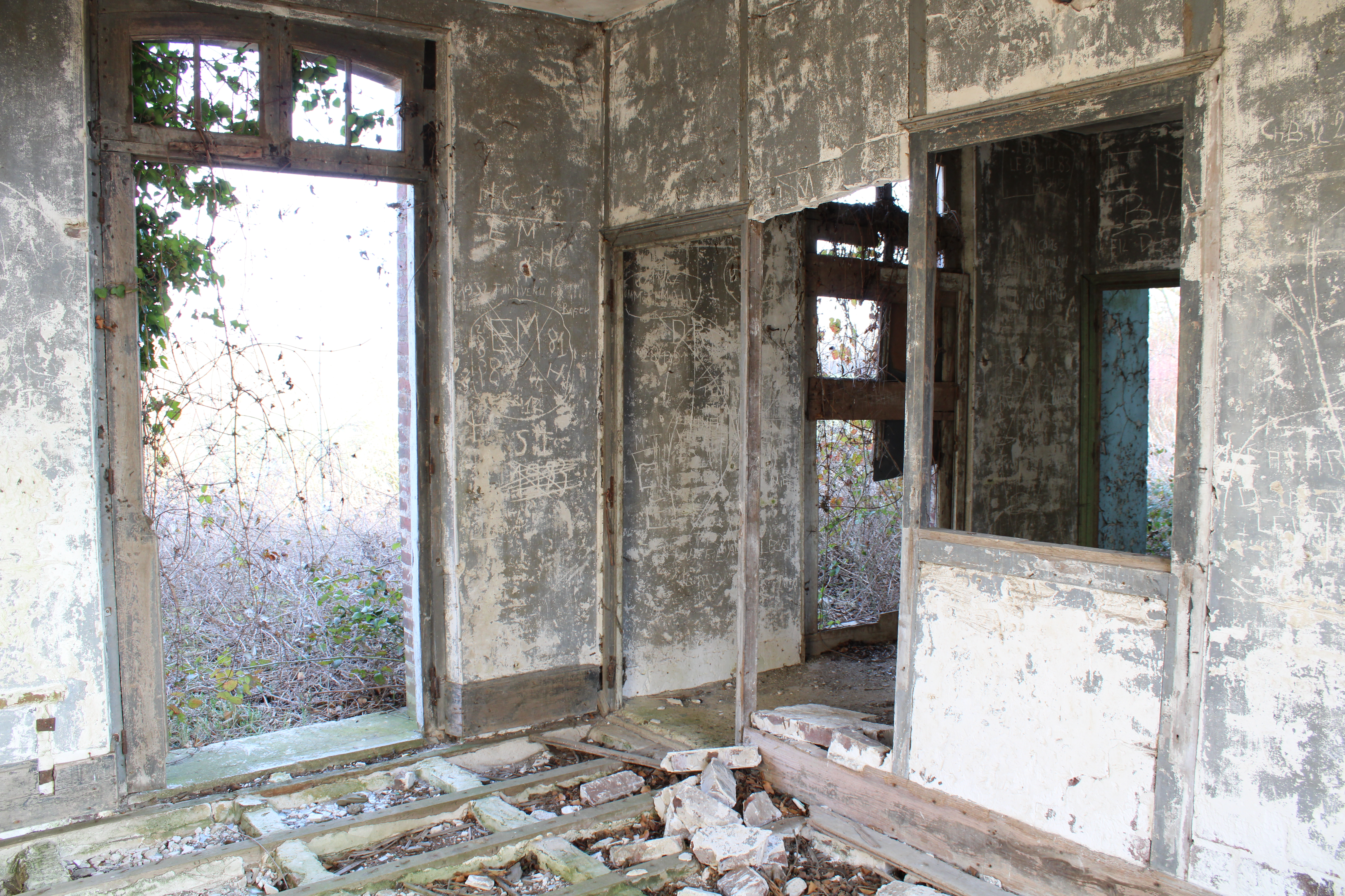 L'ancienne gare de Douilly: la salle d'attente.